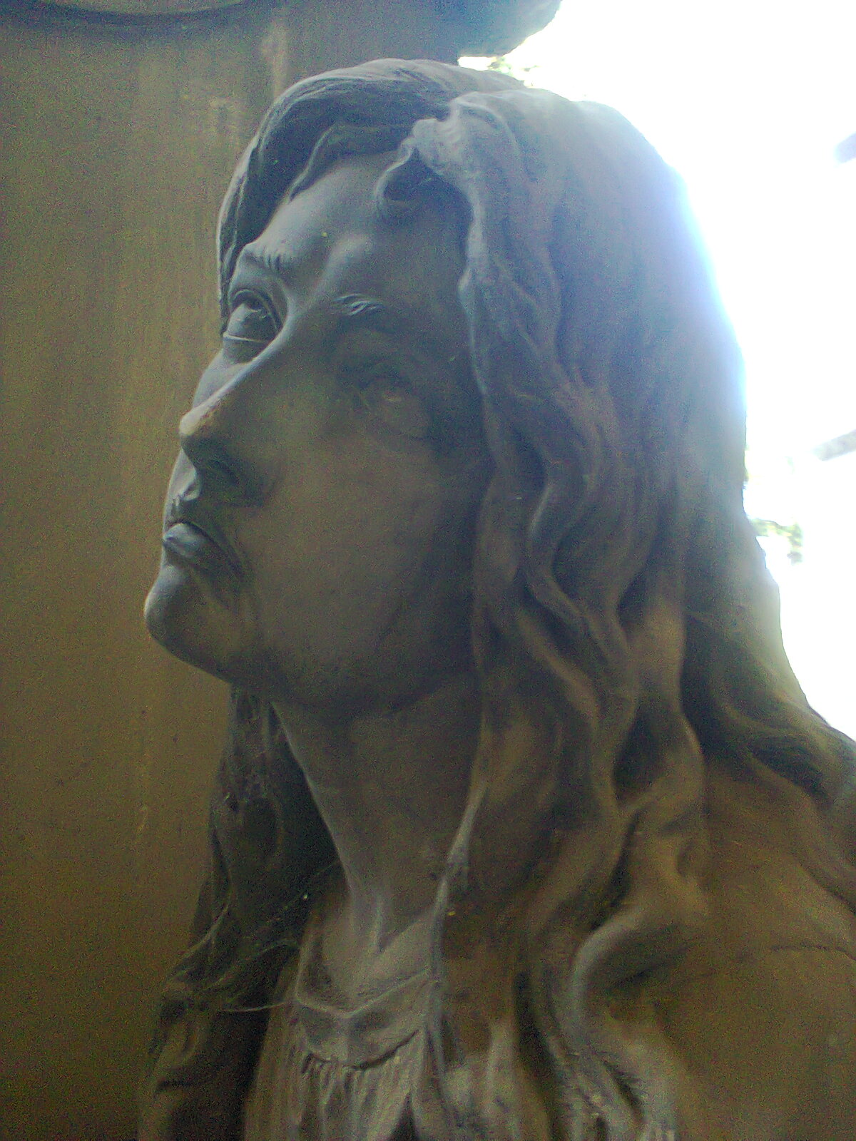 Il volto della giovane